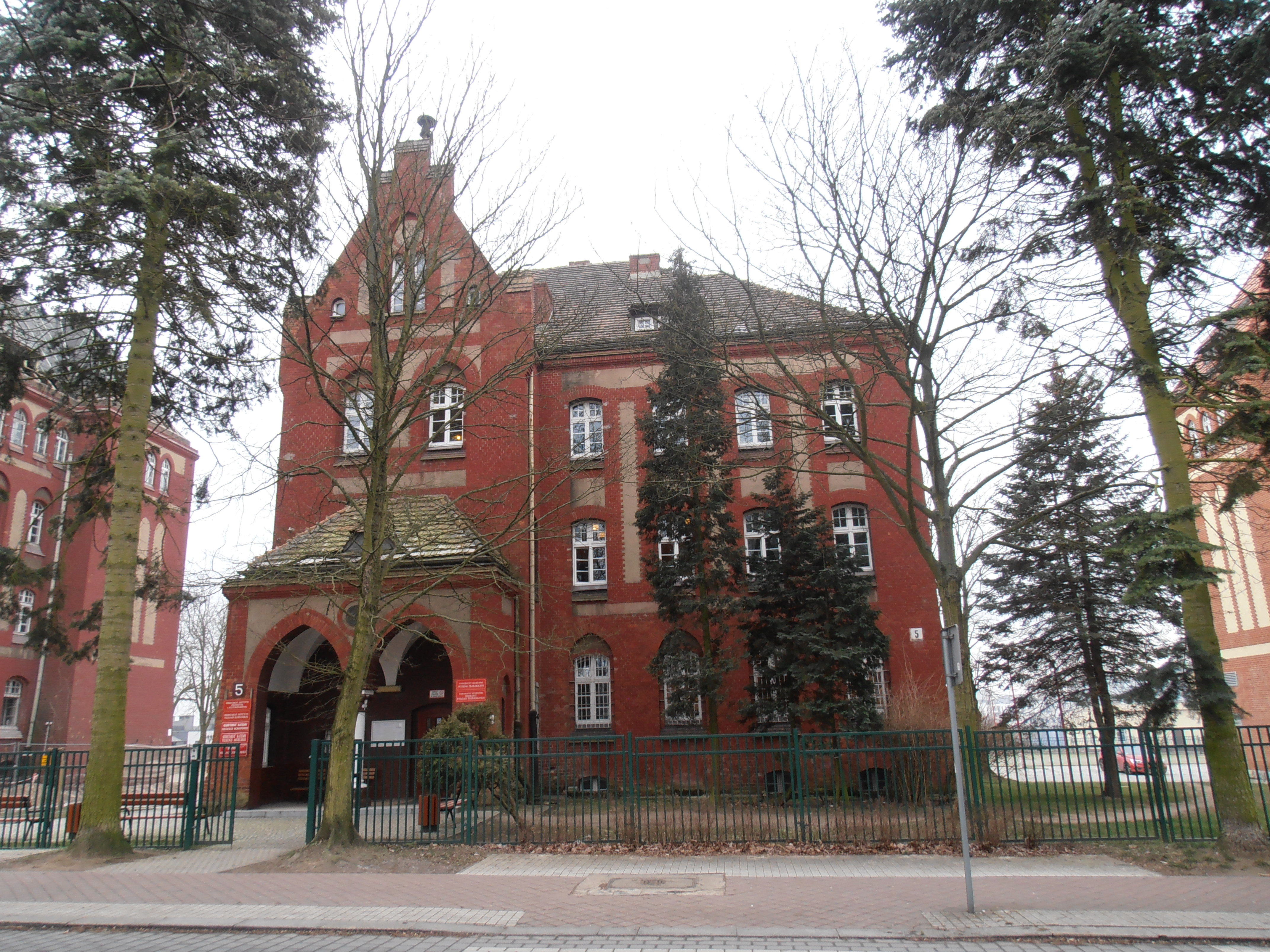 Gmach dziekanatu Wydziału Filologicznego w Szczecinie, luty 2018 r.